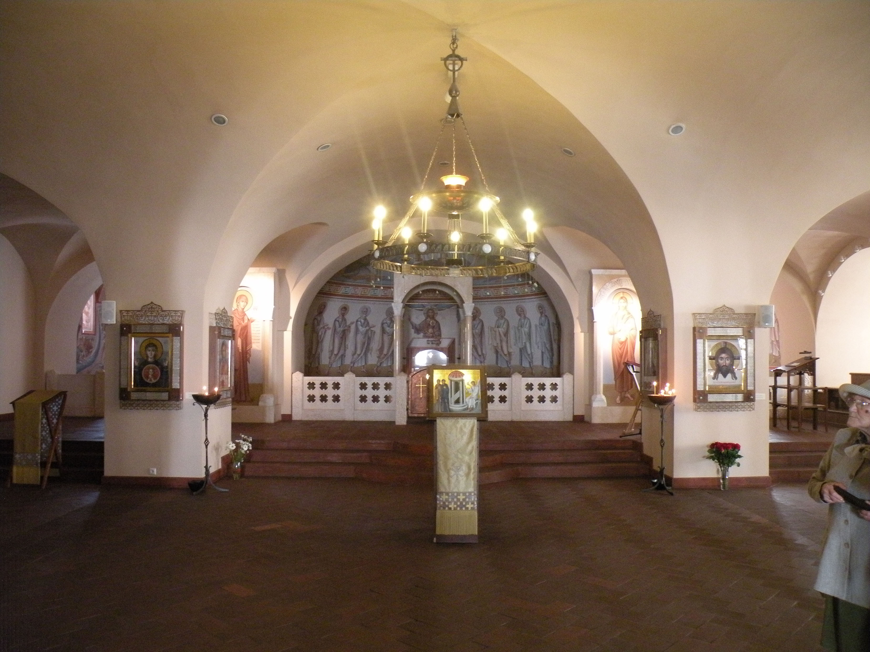 Собор Фёдоровской иконы Божией Матери Алтарь нижней церкви